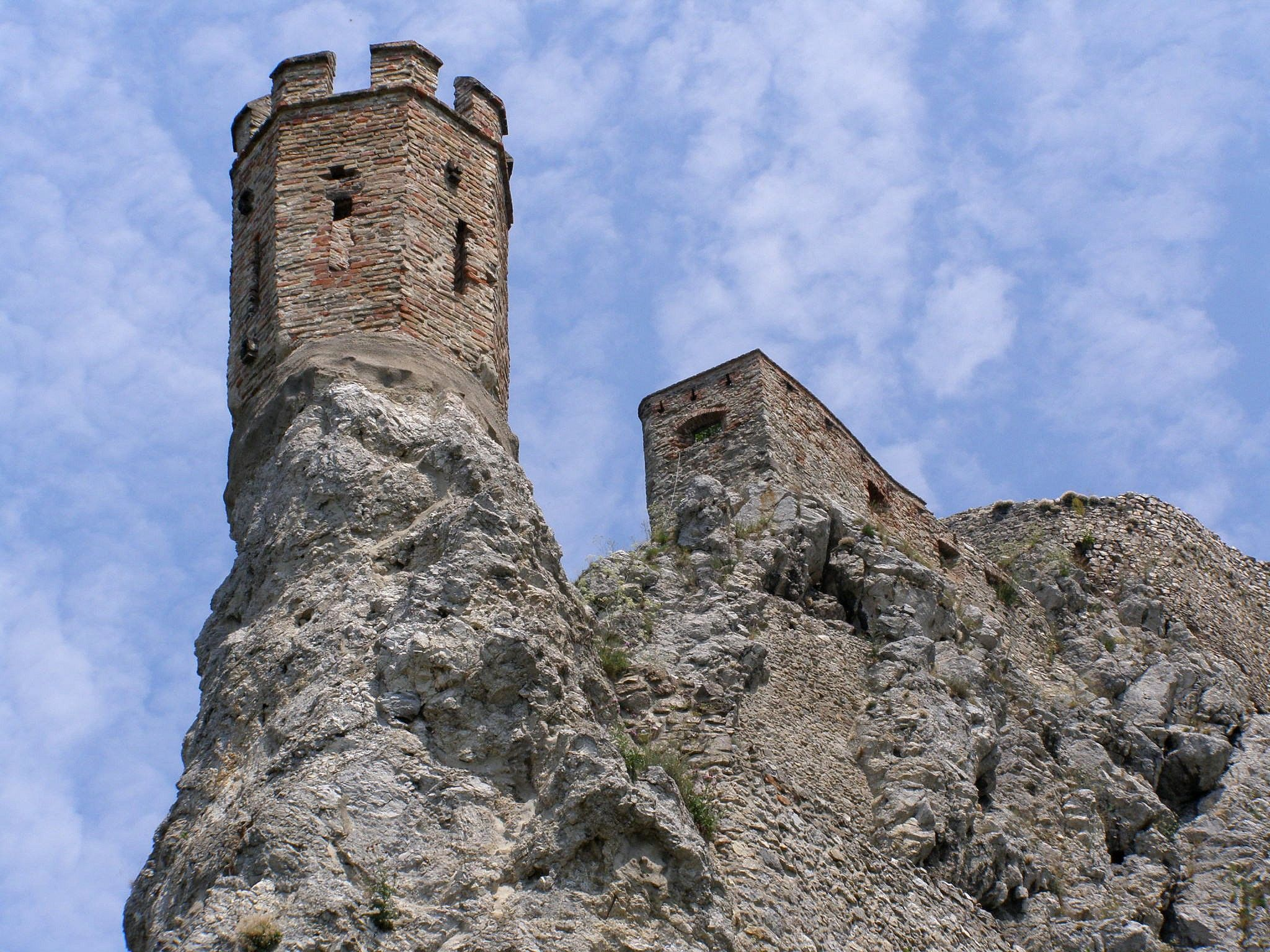 Pohľad na tzv. Panenskú vežu alebo Mníšku. Ide o polygonálnu baštu s cimburím, ktorú dali v 16. storočí postaviť Bátoriovci na vrchole vysokej štíhlej skaly nad sútokom Dunaja a Moravy. Vežička bola neskôr opradená mnohými povesťami a dodnes je jedným zo symbolov hradu